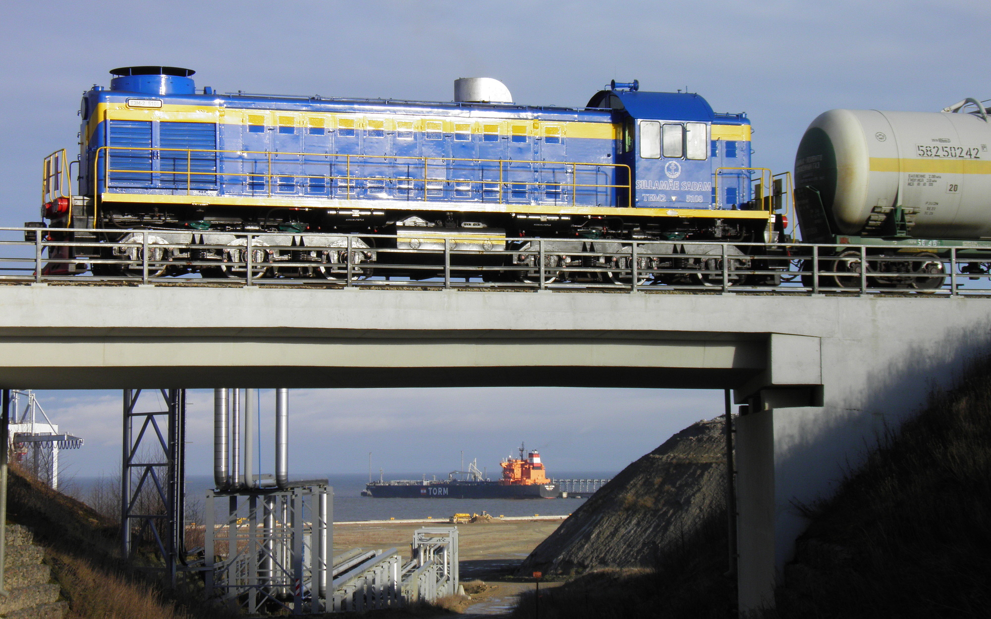 Sadama teedevõrku kuuluvad ka kahetasapinnalised ristmikud.